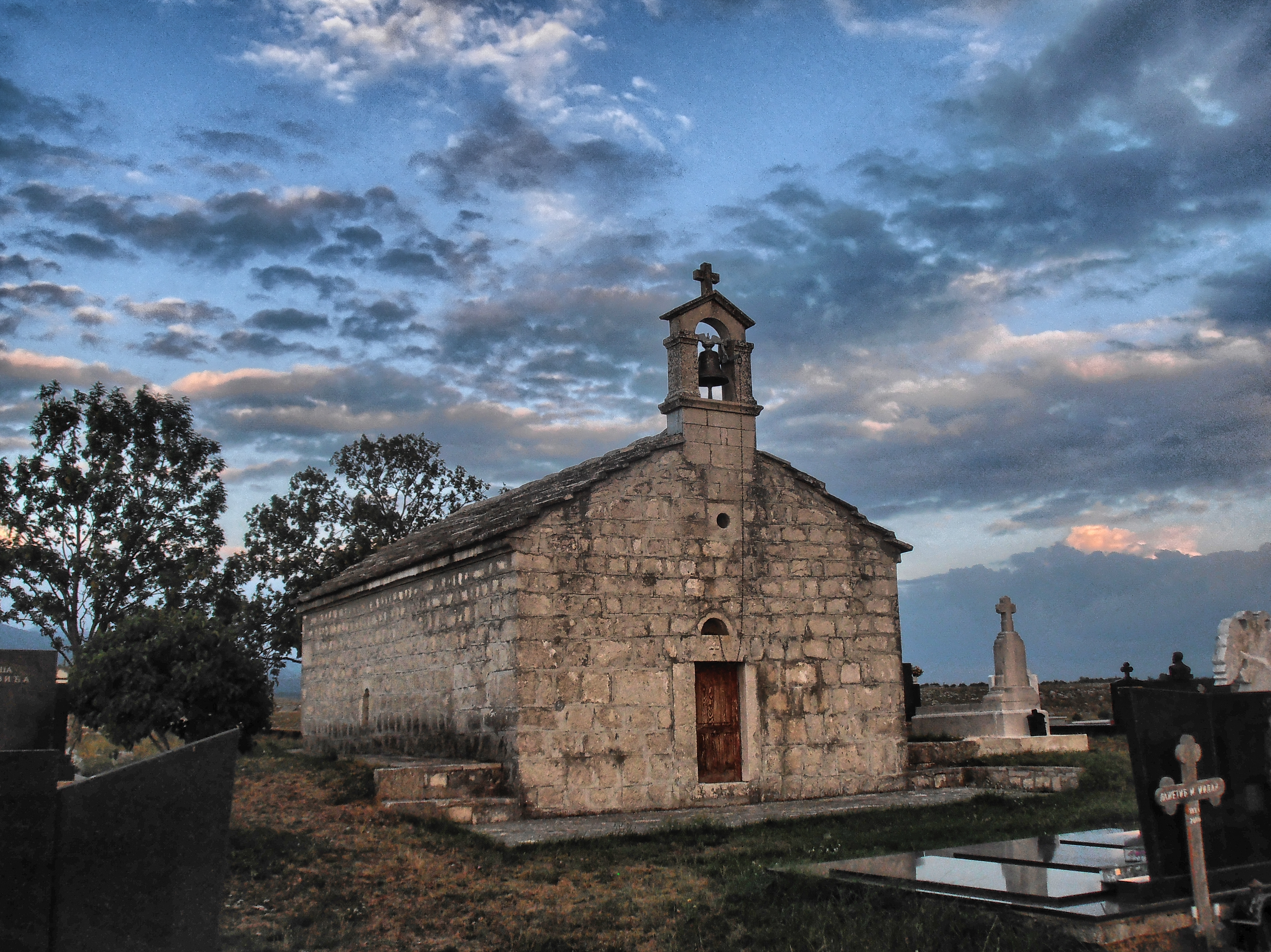 Храм Светог Николе у селу Добреља. Не зна се година кад је саграђен, из ранијег је периода. Постоји податак о обнови из 1884/9. 2001. године је обновљен и освећен This image was uploaded as part of Trace of Soul 2015.